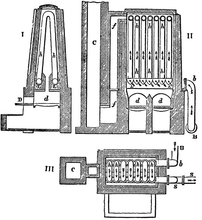 Schița preîncălzitorului tip Calder